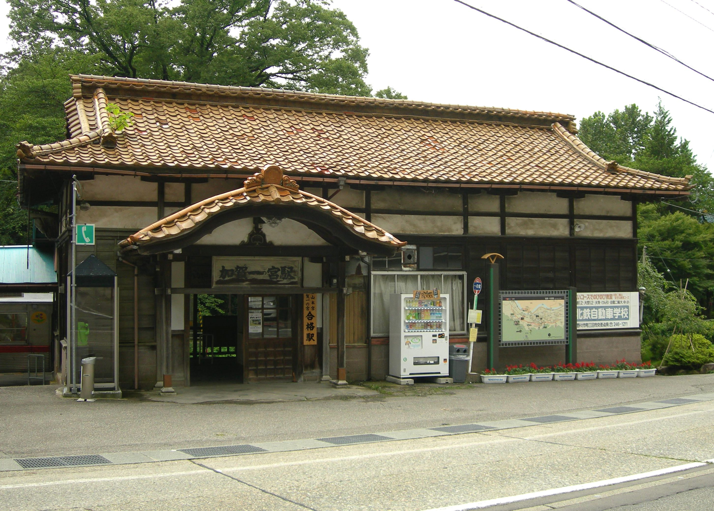 加賀一の宮駅